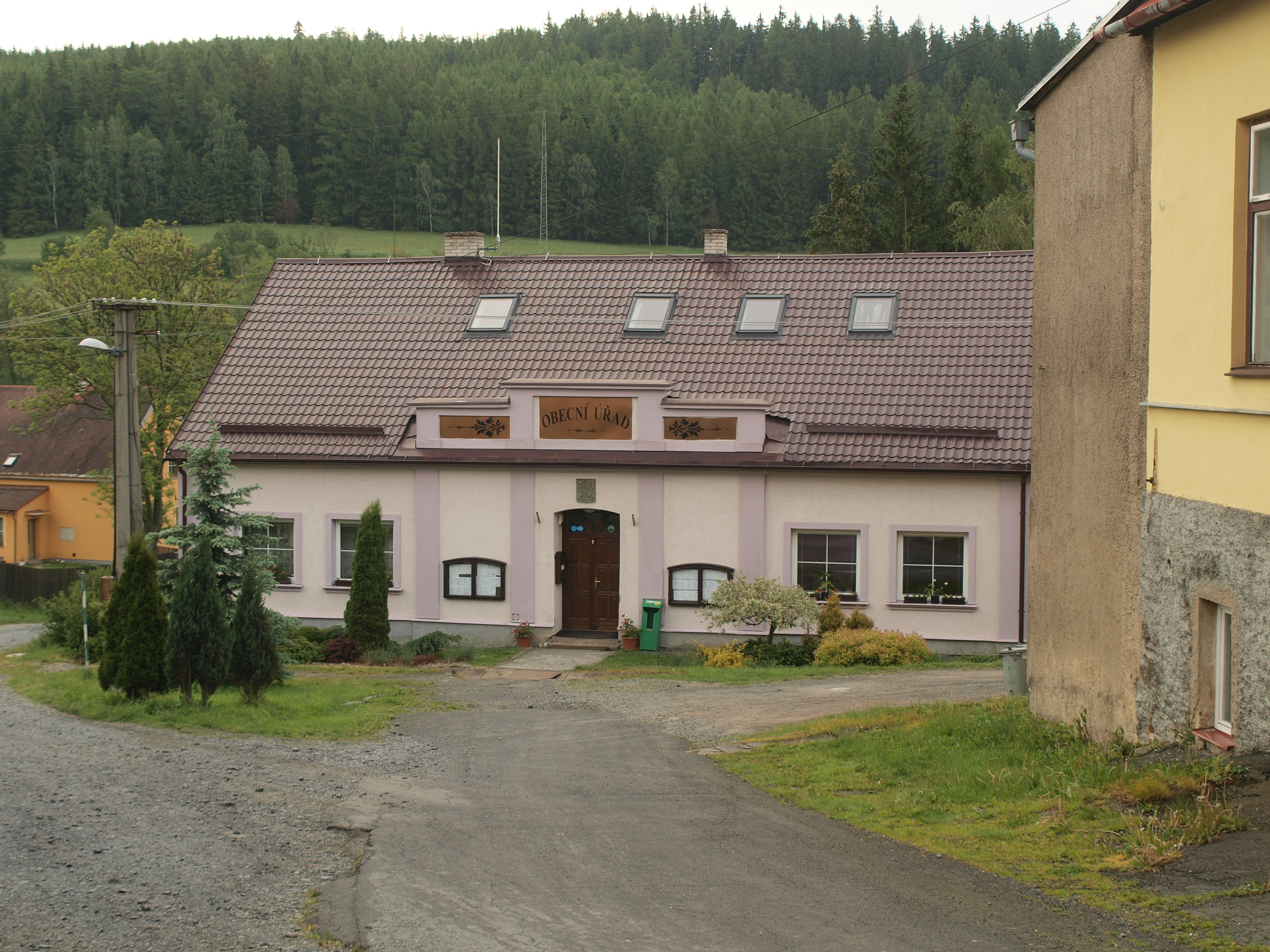 Budova obecního úřadu ve Valšově